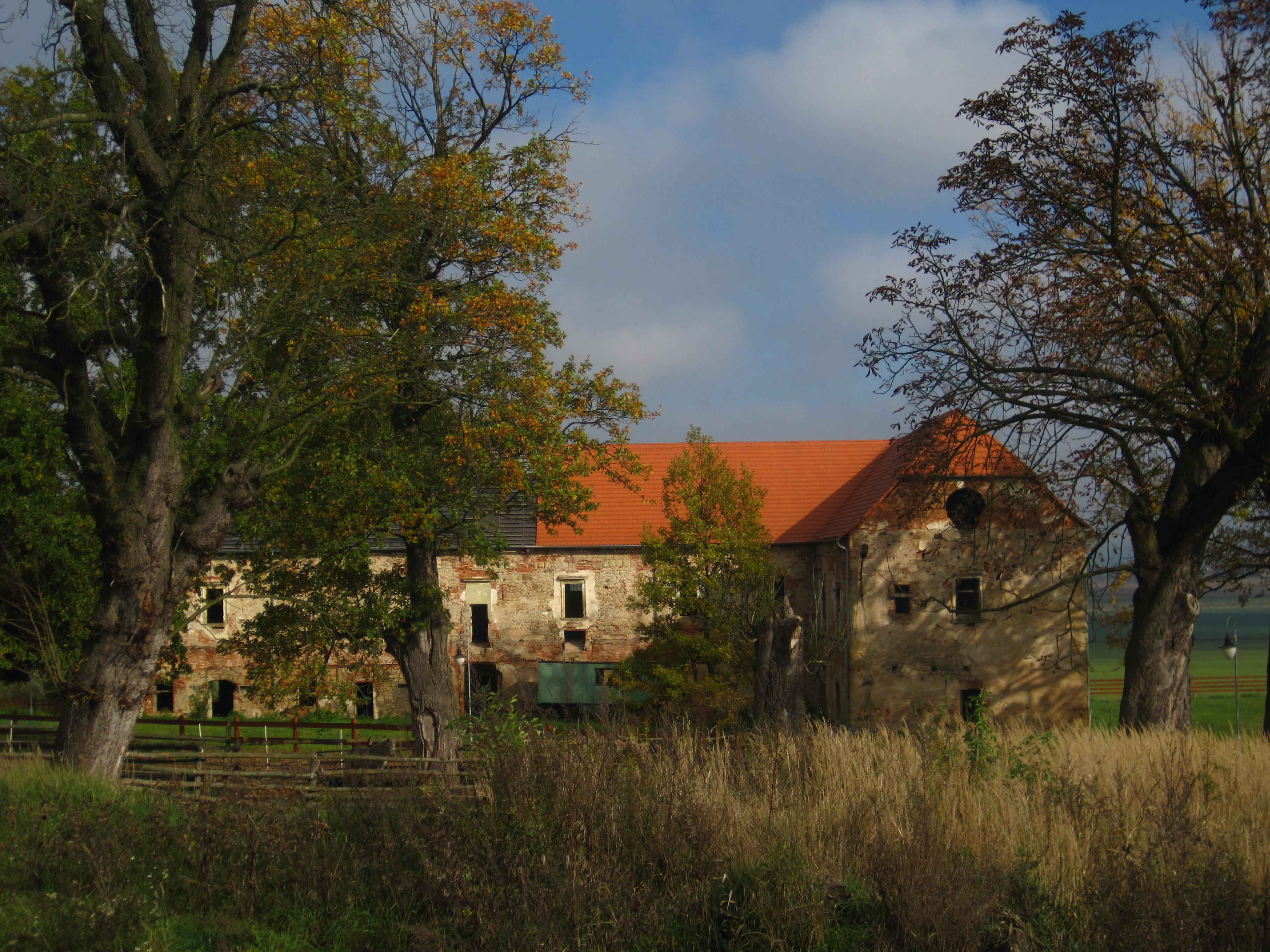 Zámek Studénka, severní část vsi, Studénka (Bakov nad Jizerou).